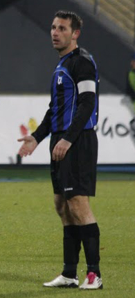 Łukasz Skrzyński podczas meczu I ligi pomiędzy Zawiszą Bydgoszcz, a Wartą Poznań